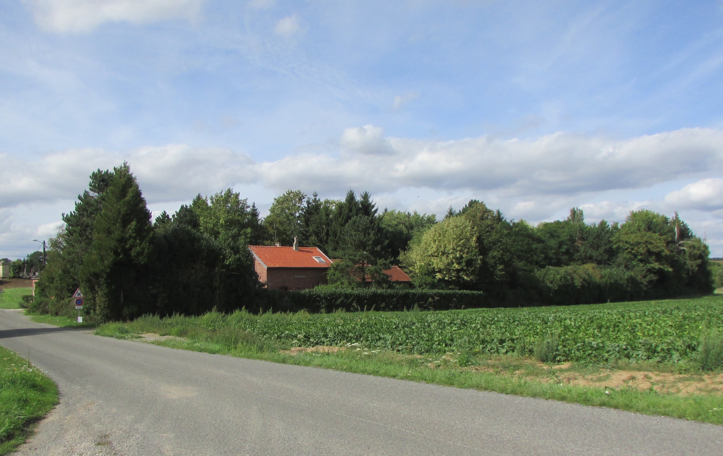 L'ancienne gare de Brancourt-le-Grand